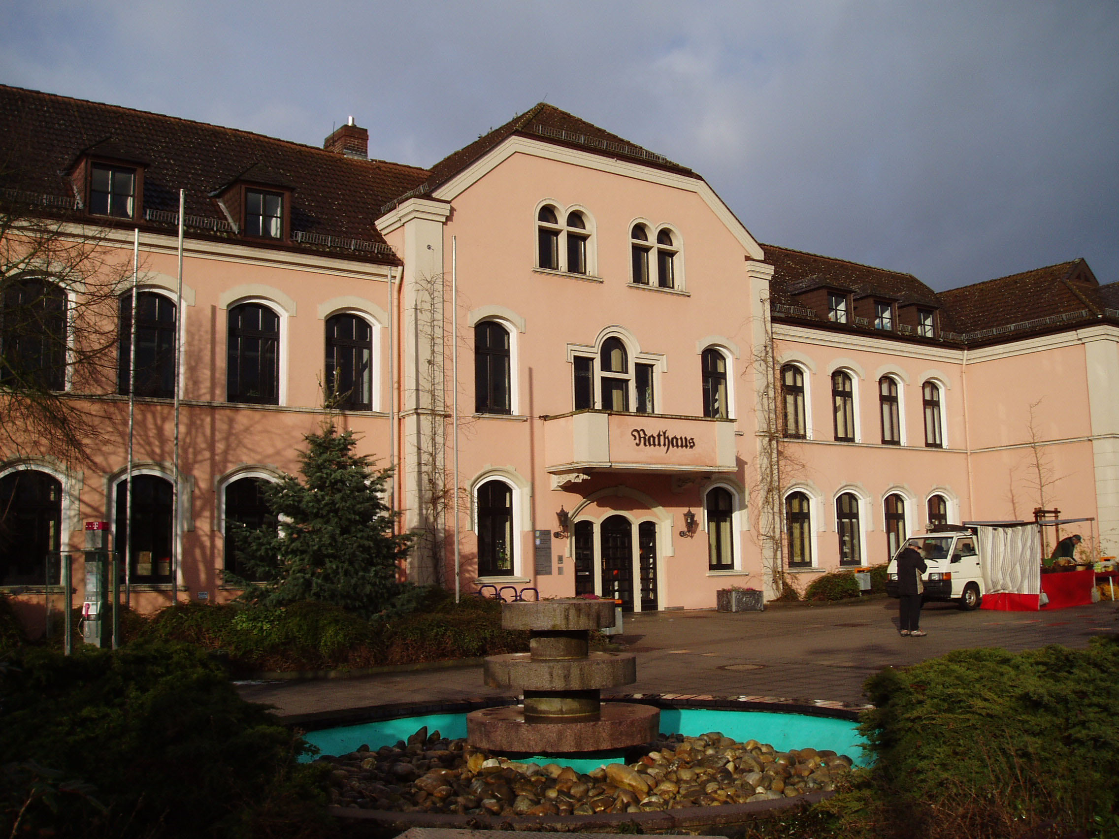 Rathaus von Niedernhausen im Taunus. Ursprünglich ein altes Schulgebäude von 1902, Erweiterungsbau von 1982.